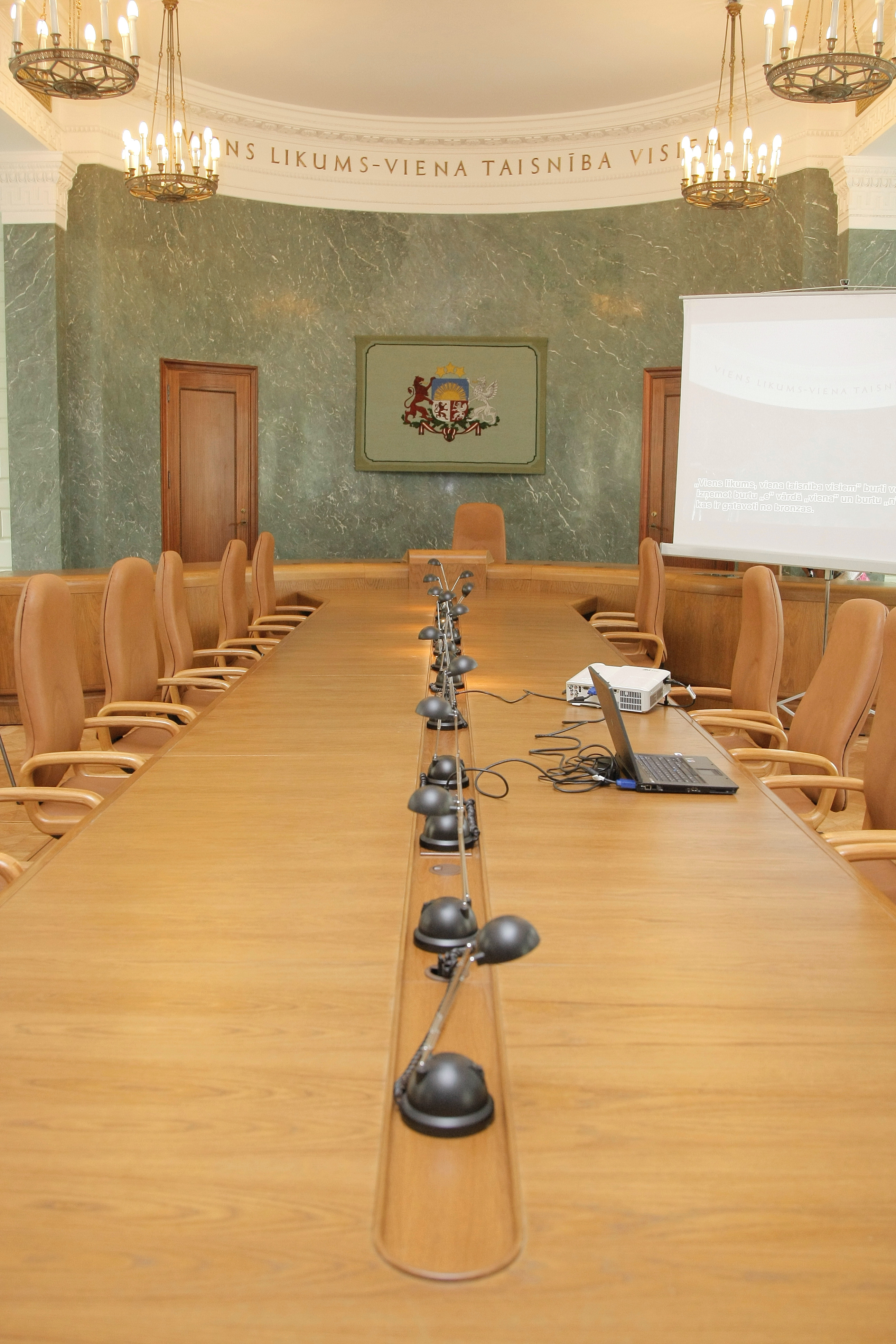 2011.gada 18.maijā Valsts kancelejas direktore Elita Dreimane iepazīstināja ar renovēto valdības sēžu zāli. Foto: Inga Kundziņa